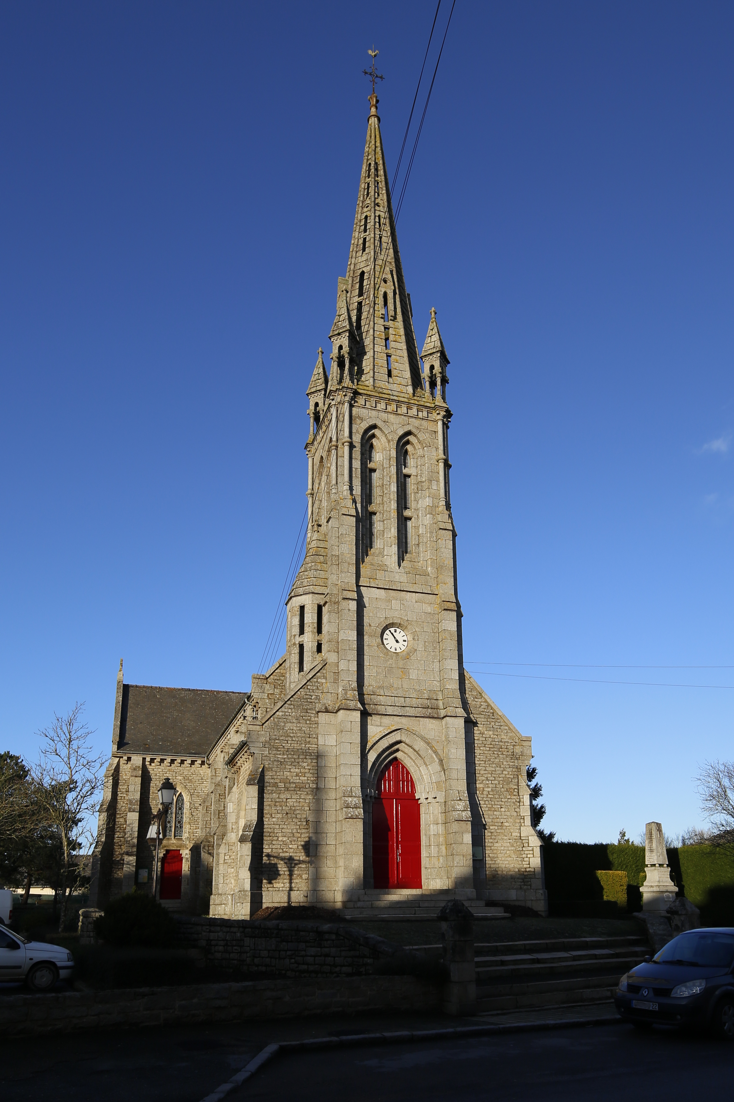 Église Saint-Jean-Baptiste de Saint-Jouan-de-l'Isle.